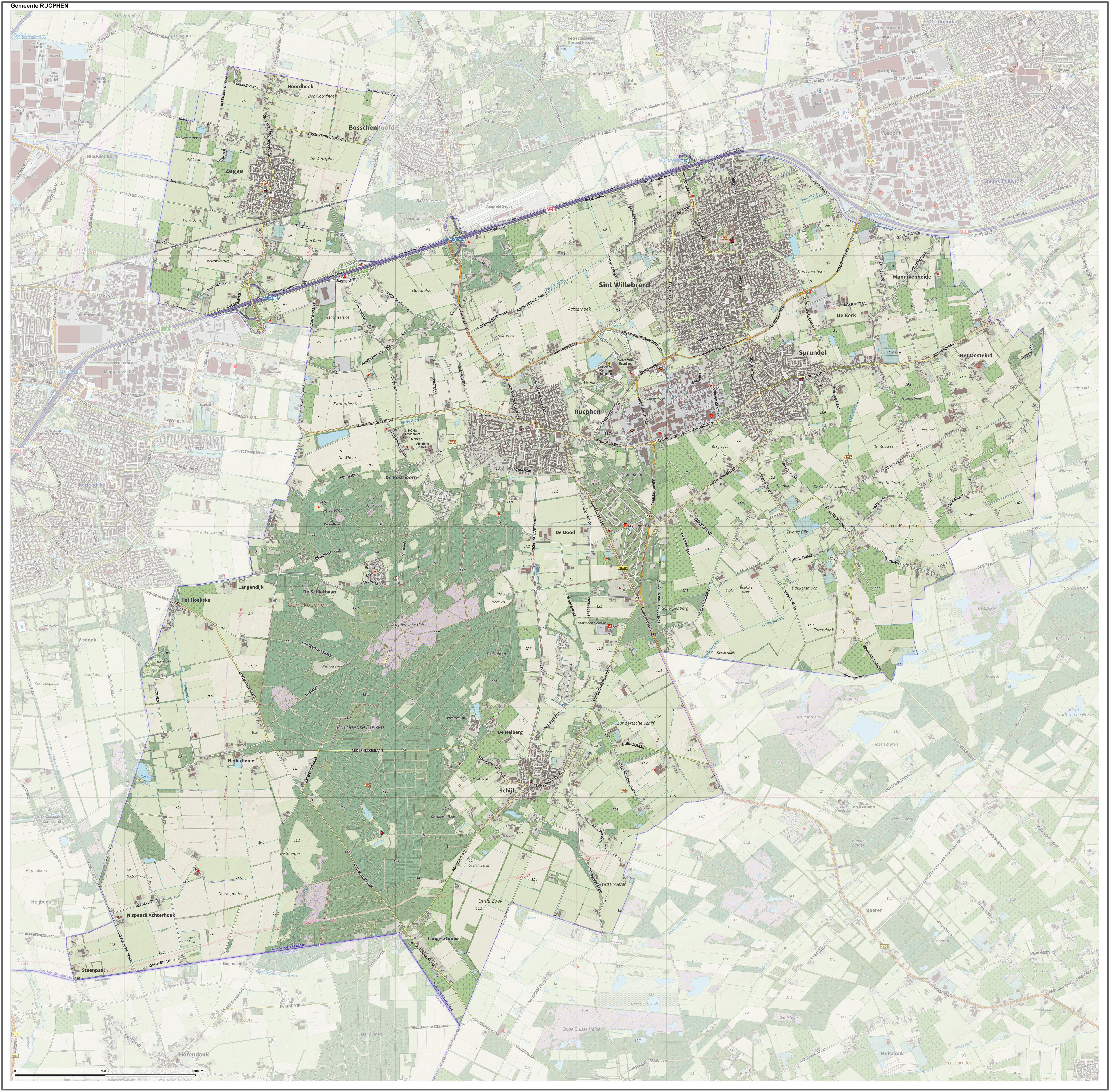 Topografische gemeentekaart. Resolutie: 400 pixels/km. Kaartbeeld samengesteld uit de open geodata van de Top10NL en Top25namen (Kadaster), Creative Commons-BY licentie. Gebouwvlakken uit open geodata BAG extract. Wegen uit de OpenStreetMap, OpenStreetMap community. Reliëfschaduw uit de Actuele Hoogtekaart AHN2. Samenstelling en kleurenschema: Jan-Willem van Aalst, met QGIS. Zie ook de Legenda.